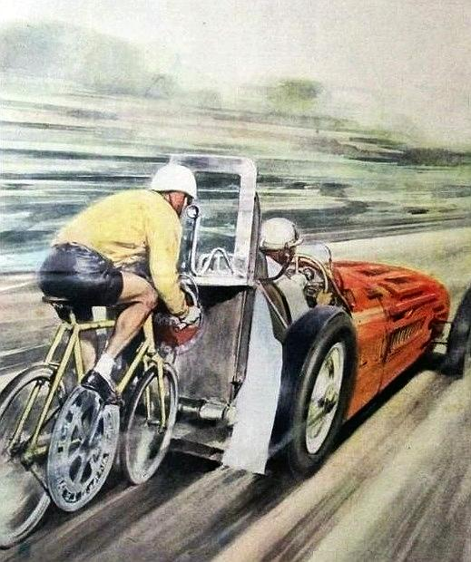 José Meiffret (1955), 'La Domenica del Corriere (della Sera)', 6 novembre 1955 (cover, between St Dizier and Vitry).